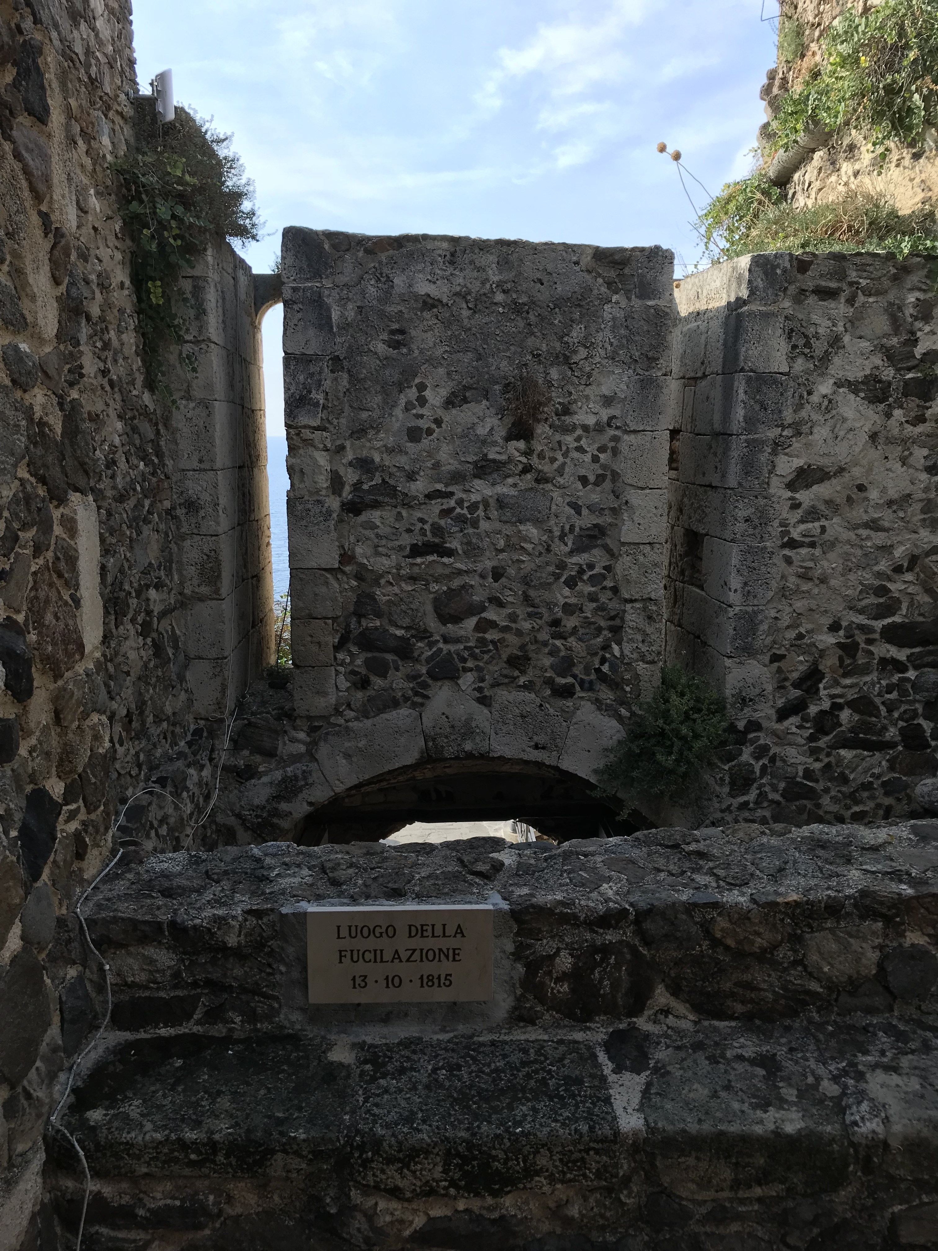 castello Murat This is a photo of a monument which is part of cultural heritage of Italy.